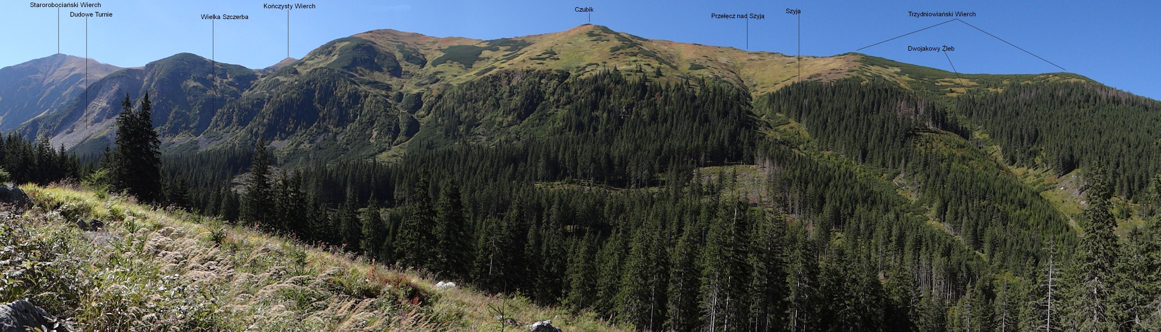 Widok z Doliny Starorobociańskiej